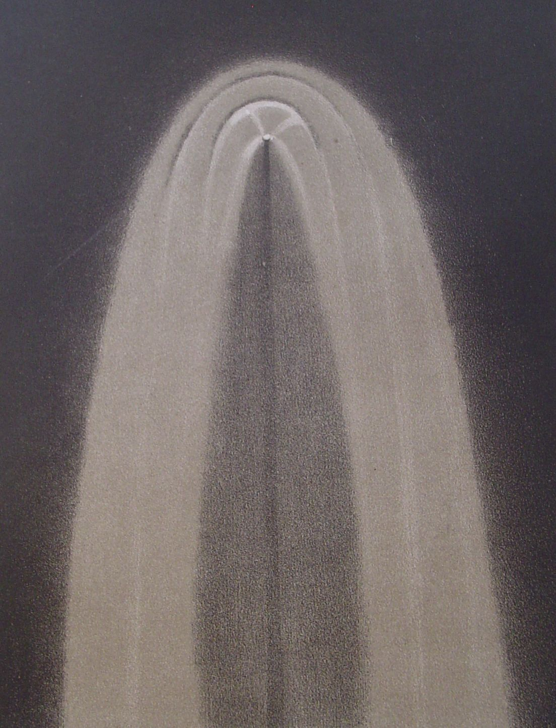 Kometa Donatiego, rysunek z 2-10-1858 roku. Autor ryciny to W. C. Bond, rysunek umieszczony w książce Astronomie Karla von Littrowa z 1878 roku.